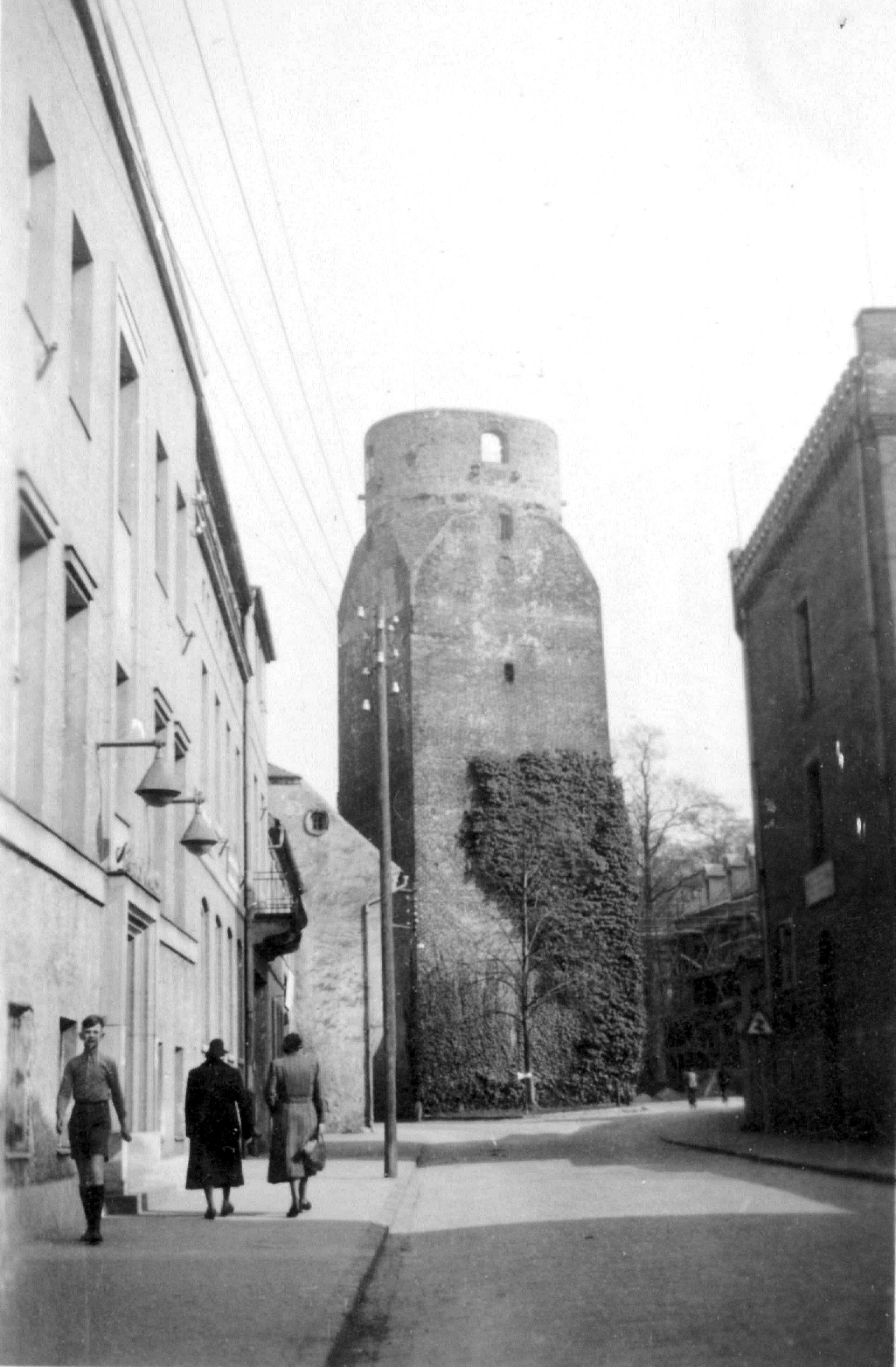 Lubwartturm